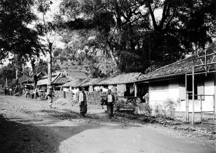 Negatief. Tuntangseweg bij Tuntang, Midden-Java